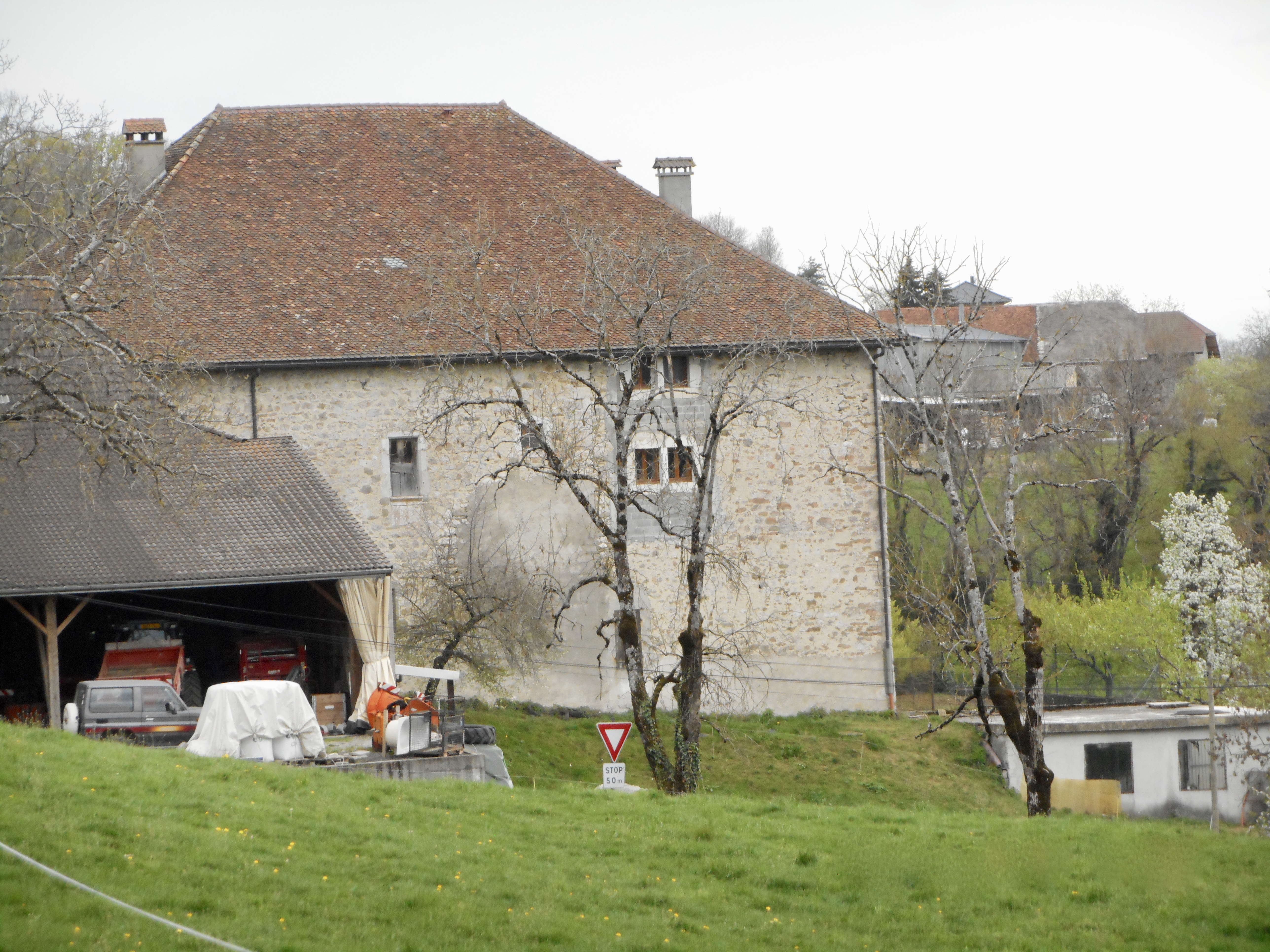 Château de Disonche (Villaz), XIIIe siècle.